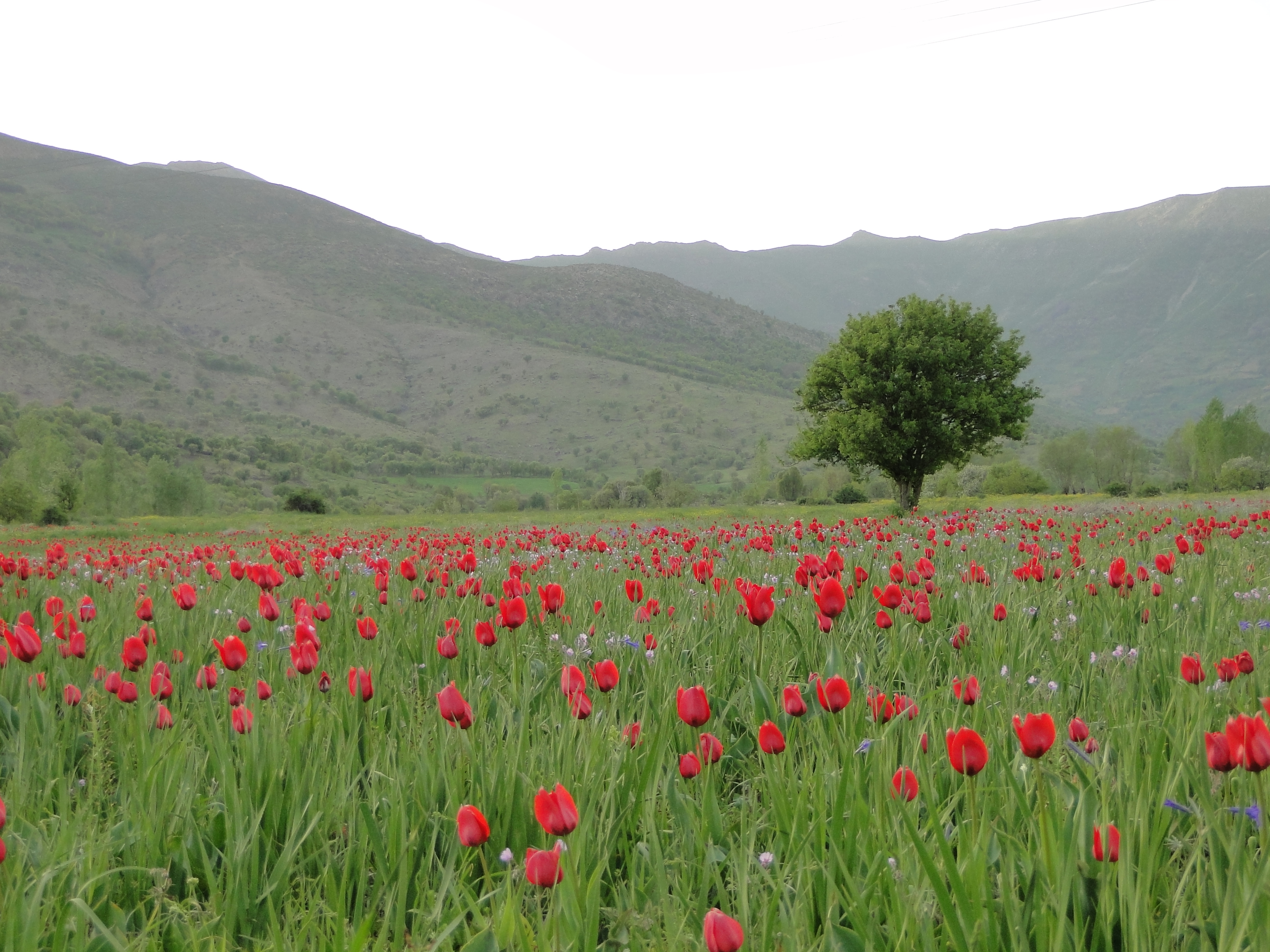 نژو